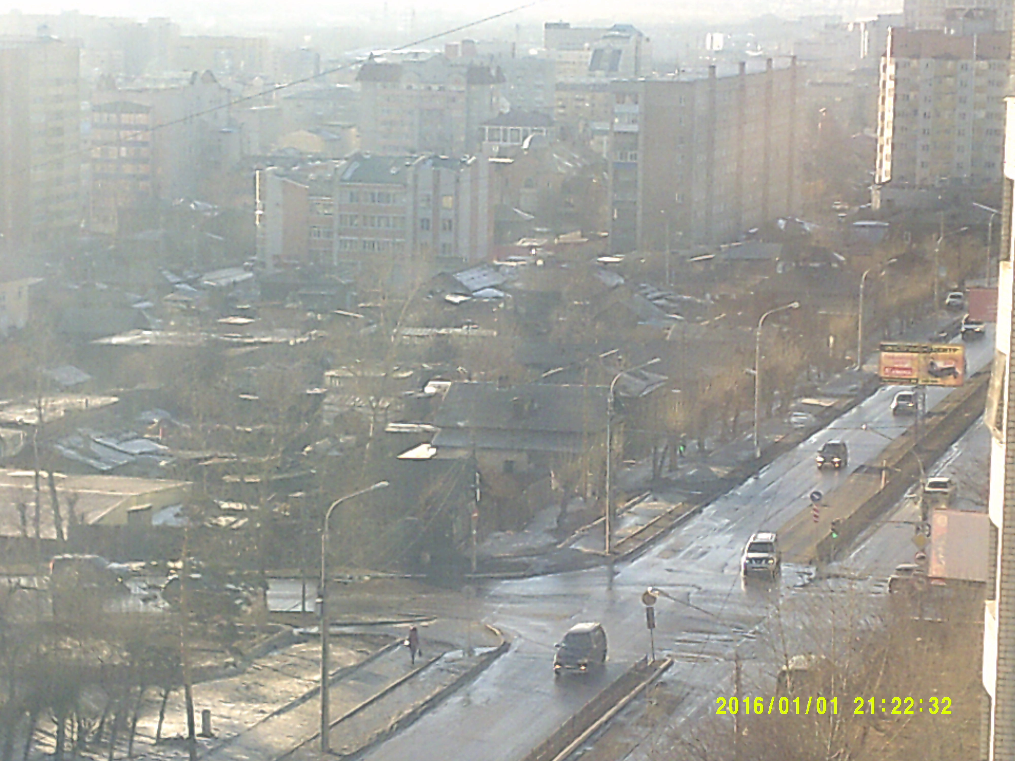 Мартовская оттепель в Чите.Температура- -3...+2 С.Дата в правом нижнем углу экрана выставлена неправильно из-за смены батареек.